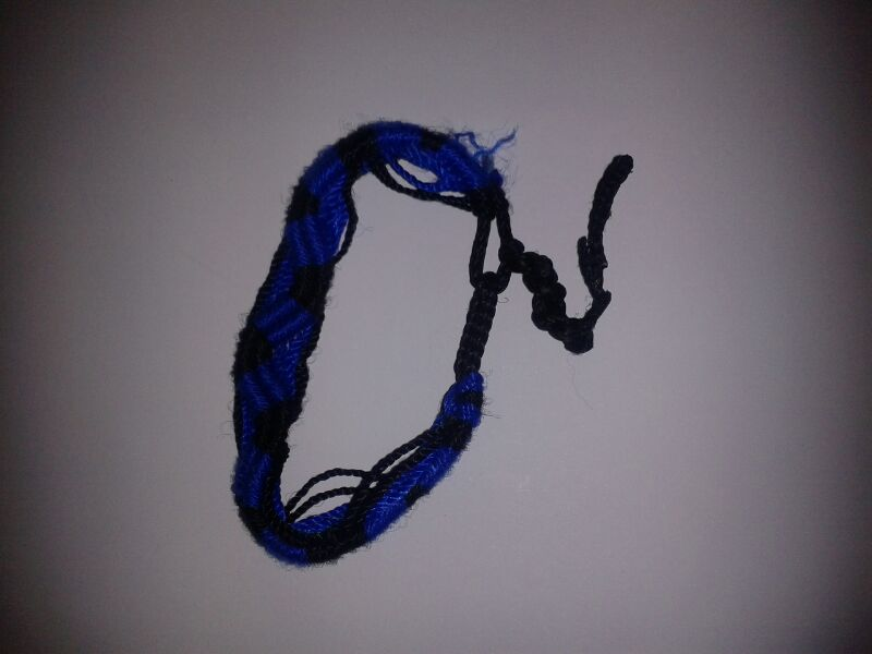 Són braçalets propis per a una entrada en Viquipèdia